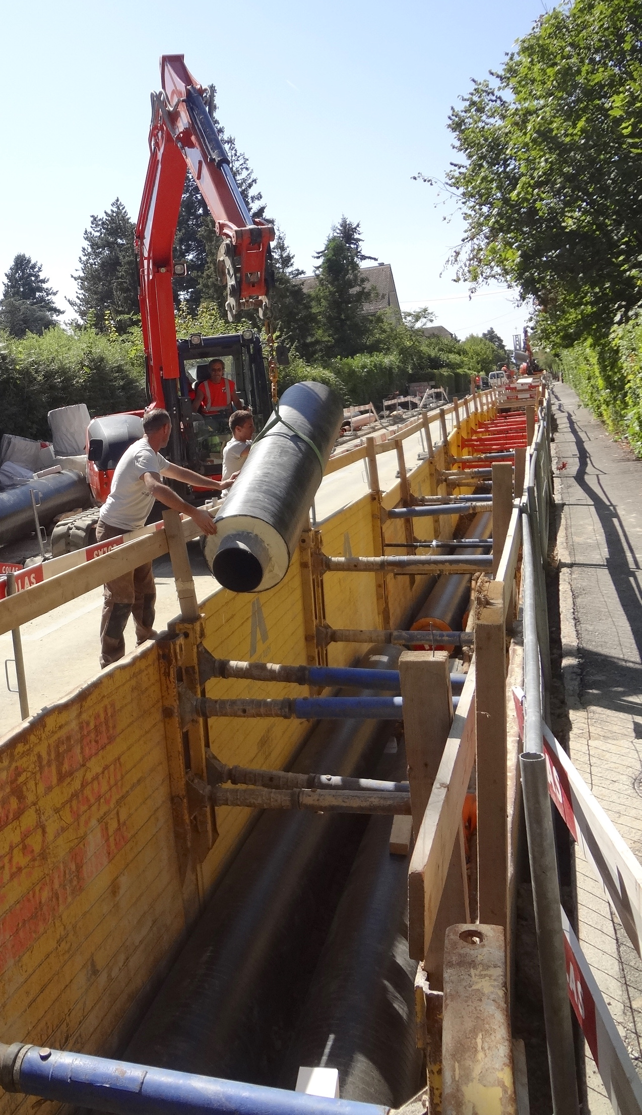 Installation de conduites pour le chauffage à distance dans le quartier du Mervelet à Genève (chemin Charles Georg). Extension du réseau CAD SIG (chauffage à distance des Services industriels de Genève).